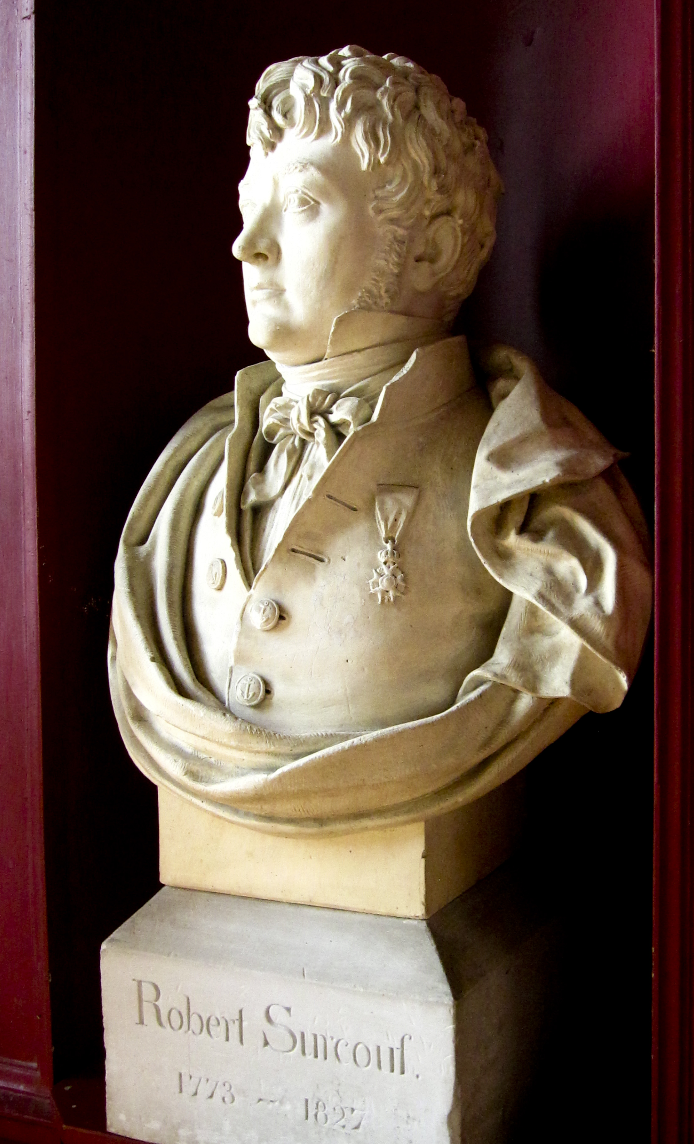 Statue de Robert Surcouf 1773-1825